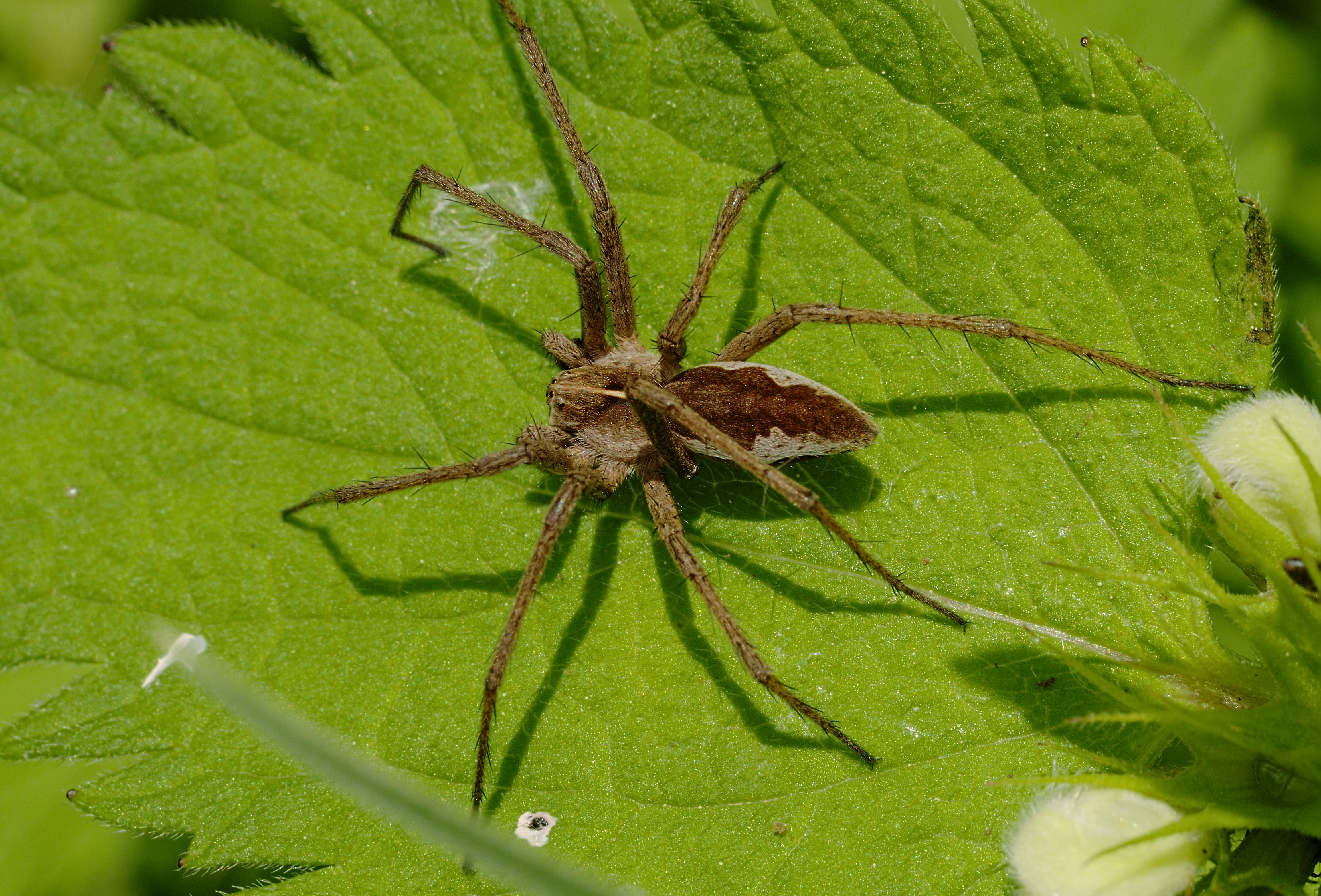 Listspinne - Pisaura mirabilis, Männchen. Aufgenommen in Mannheim, Kirschgartshäuser Schläge, Baden-Württemberg, Deutschland.